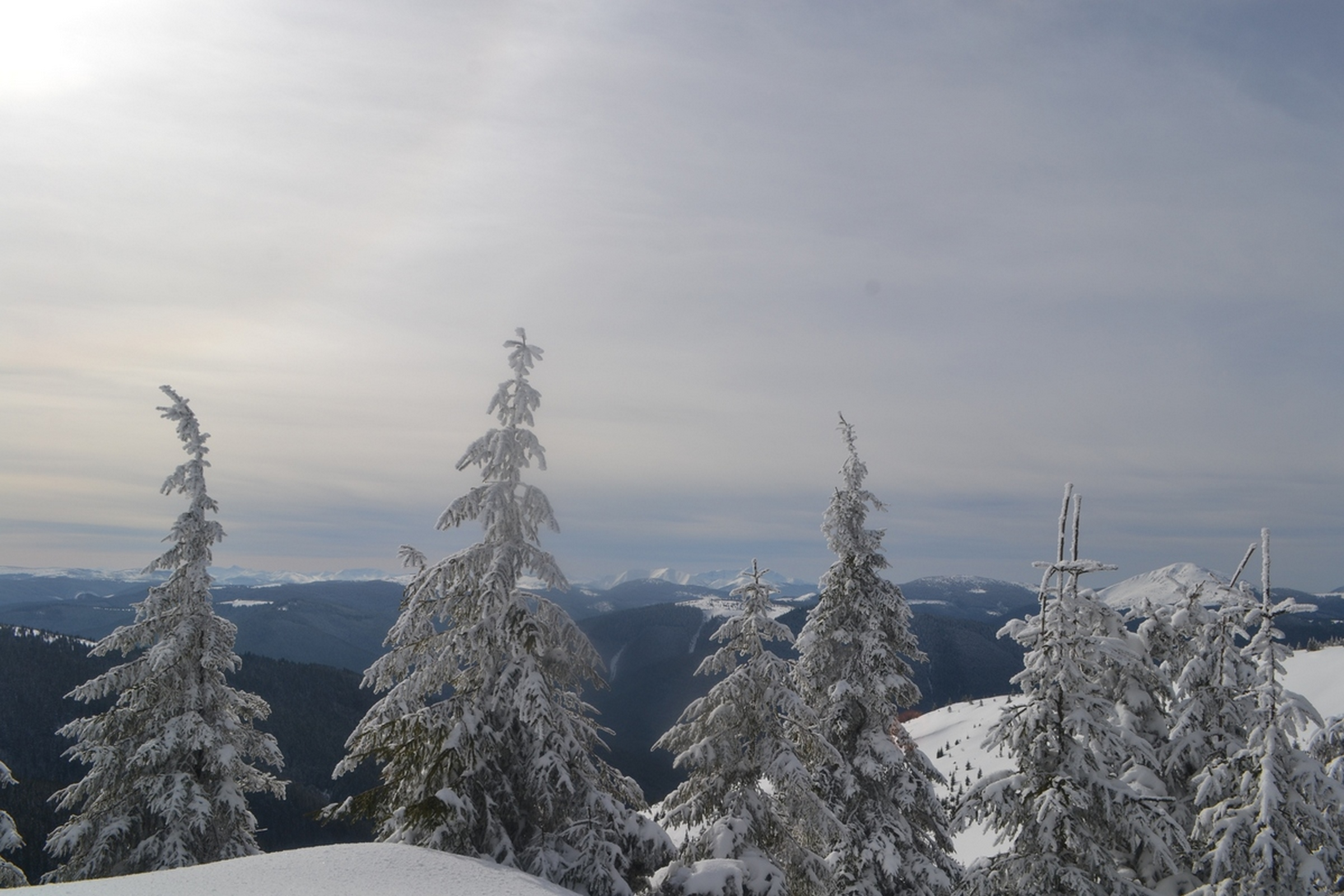 Гриня́вські гори